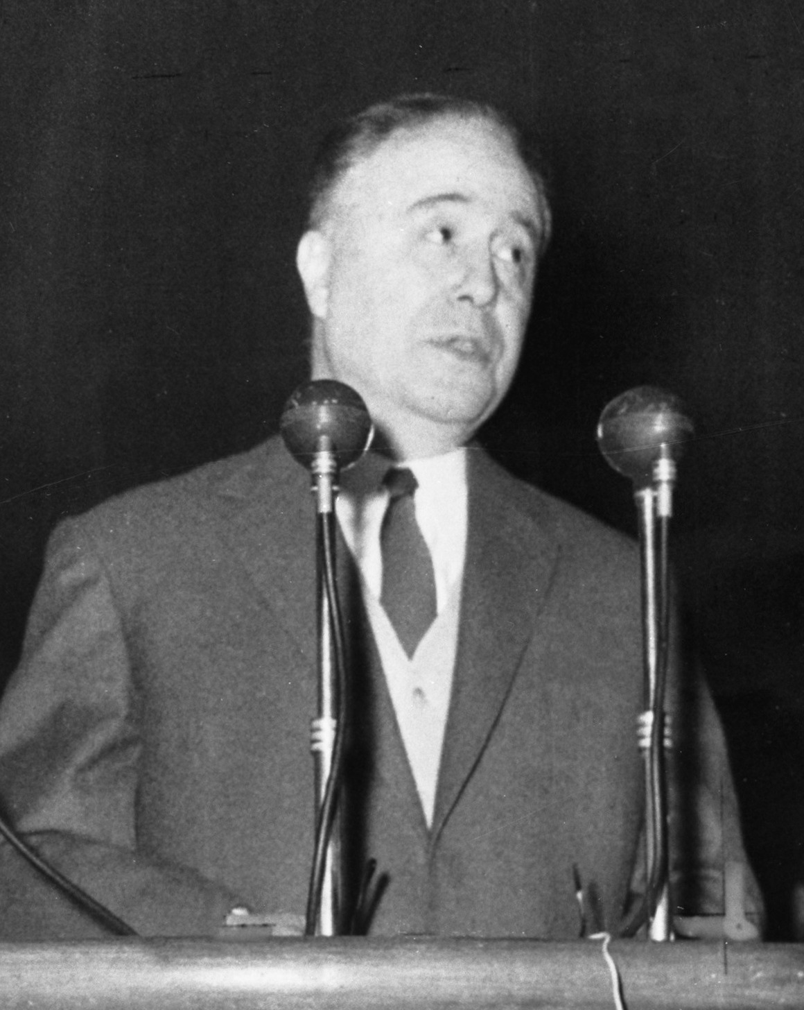 Leo Collard